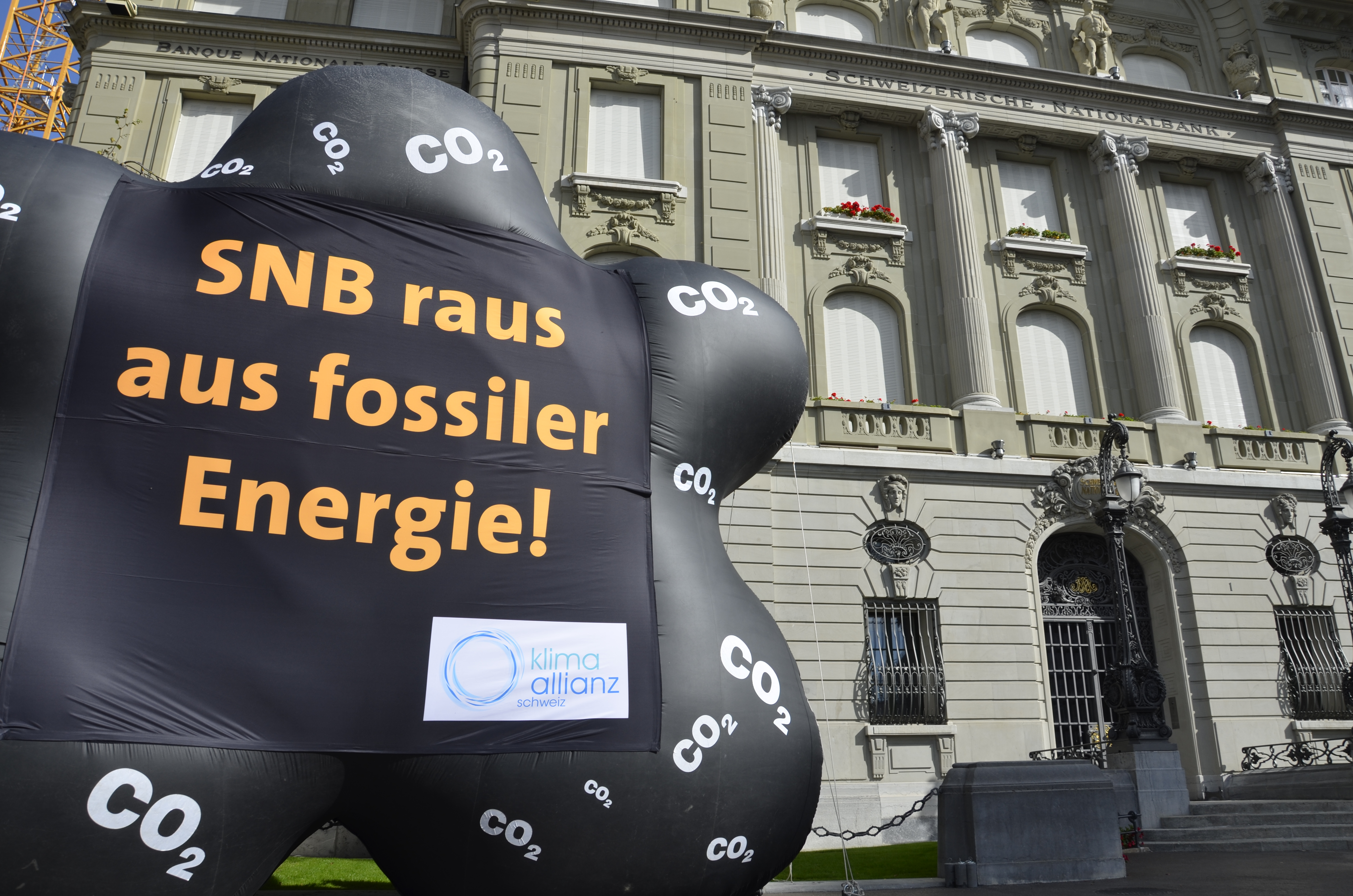 Klimademo Bern vor Schweizerischer Nationalbank